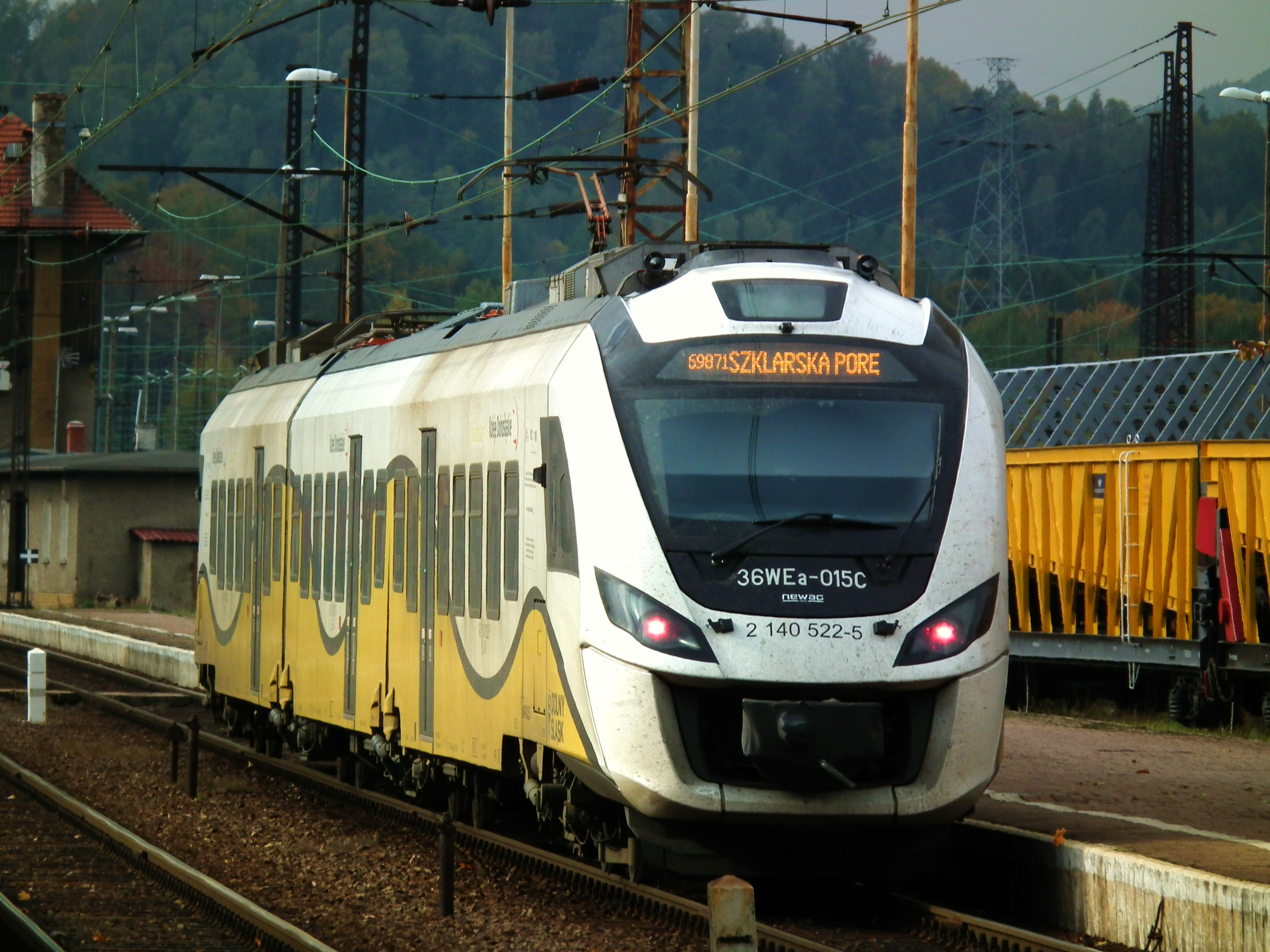 36WE-015 na stacji Wałbrzych Gł. w kierunku Jeleniej Góry i Szklarskiej Poręby.